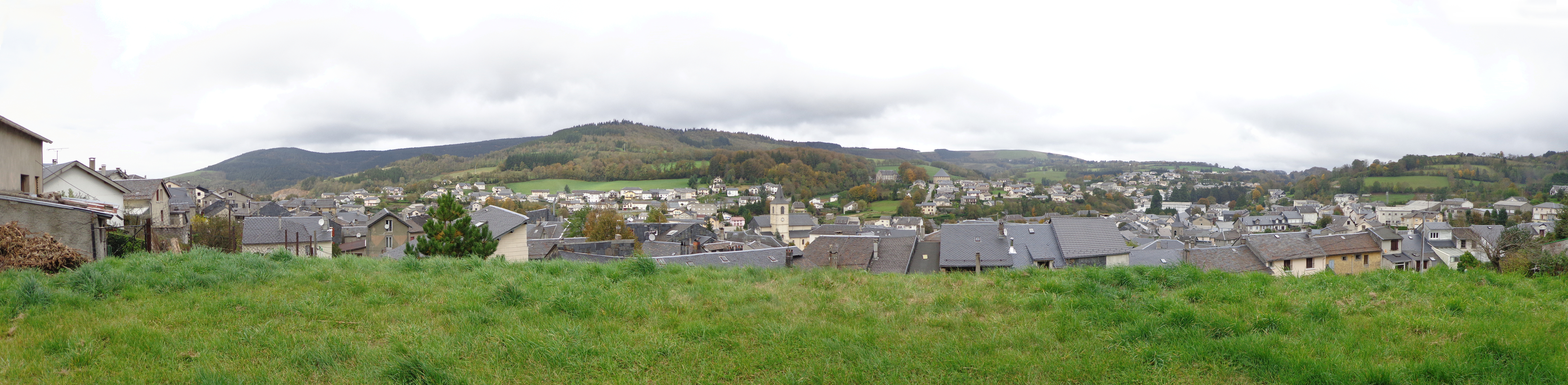 Lacaune (Tarn) - panorama, pris du sud de la ville.